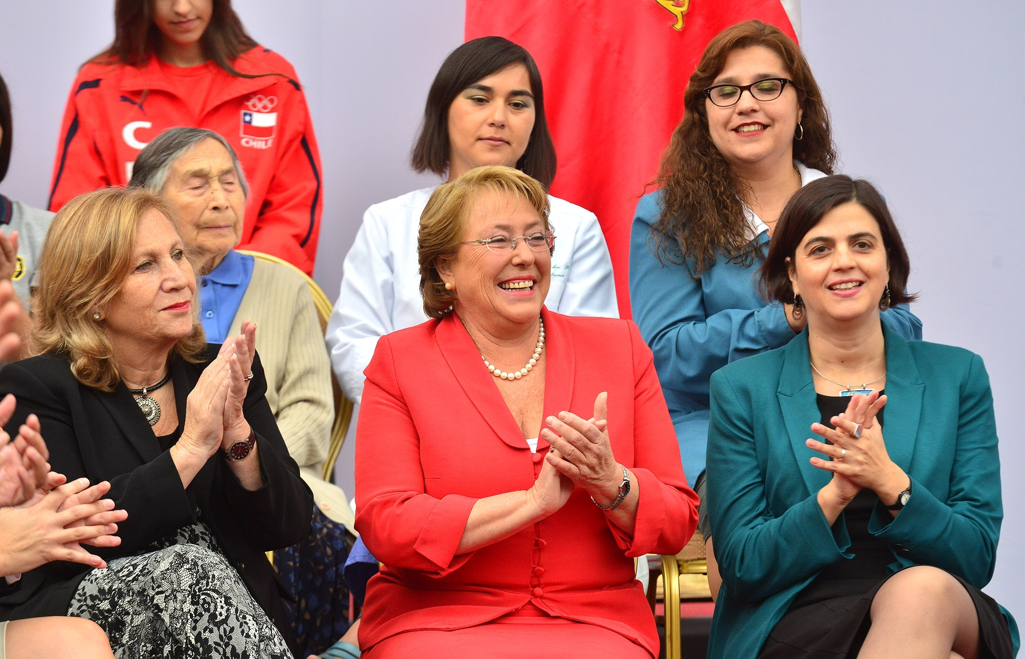 Presidenta Michelle Bachelet firma proyecto de ley que crea el Ministerio de la Mujer y la Equidad de Género